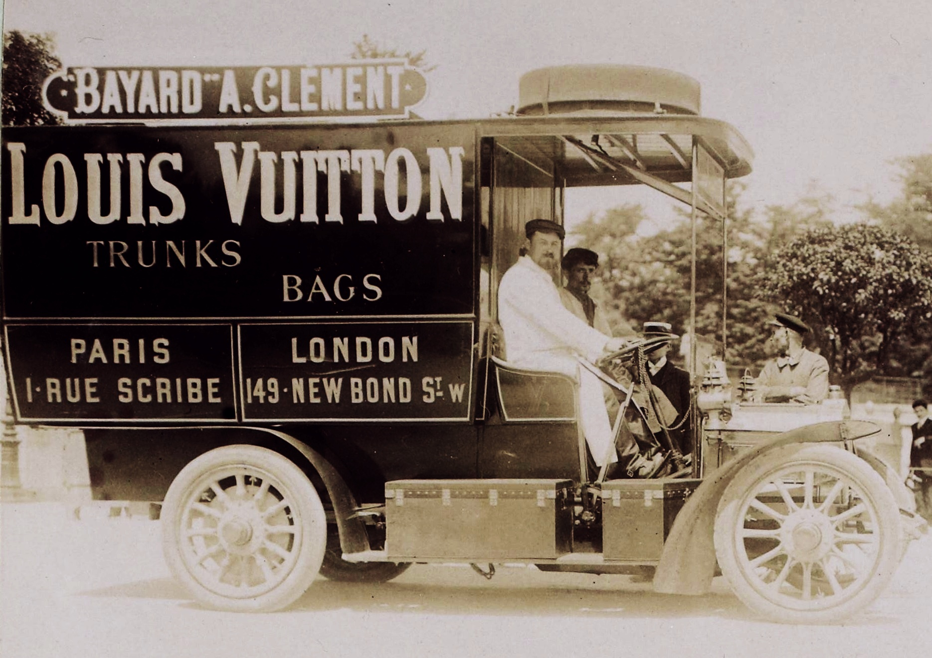 [Collection Jules Beau. Photographie sportive] : T. 32. AnnÃ©e 1906 / Jules Beau : F. 12v. [Concours International de vÃ©hicules industriels, Paris - Tourcoing, organisÃ© par l' A. C.[Autocycle Club] du Nord de la France, 6 - 17 juin 1906]